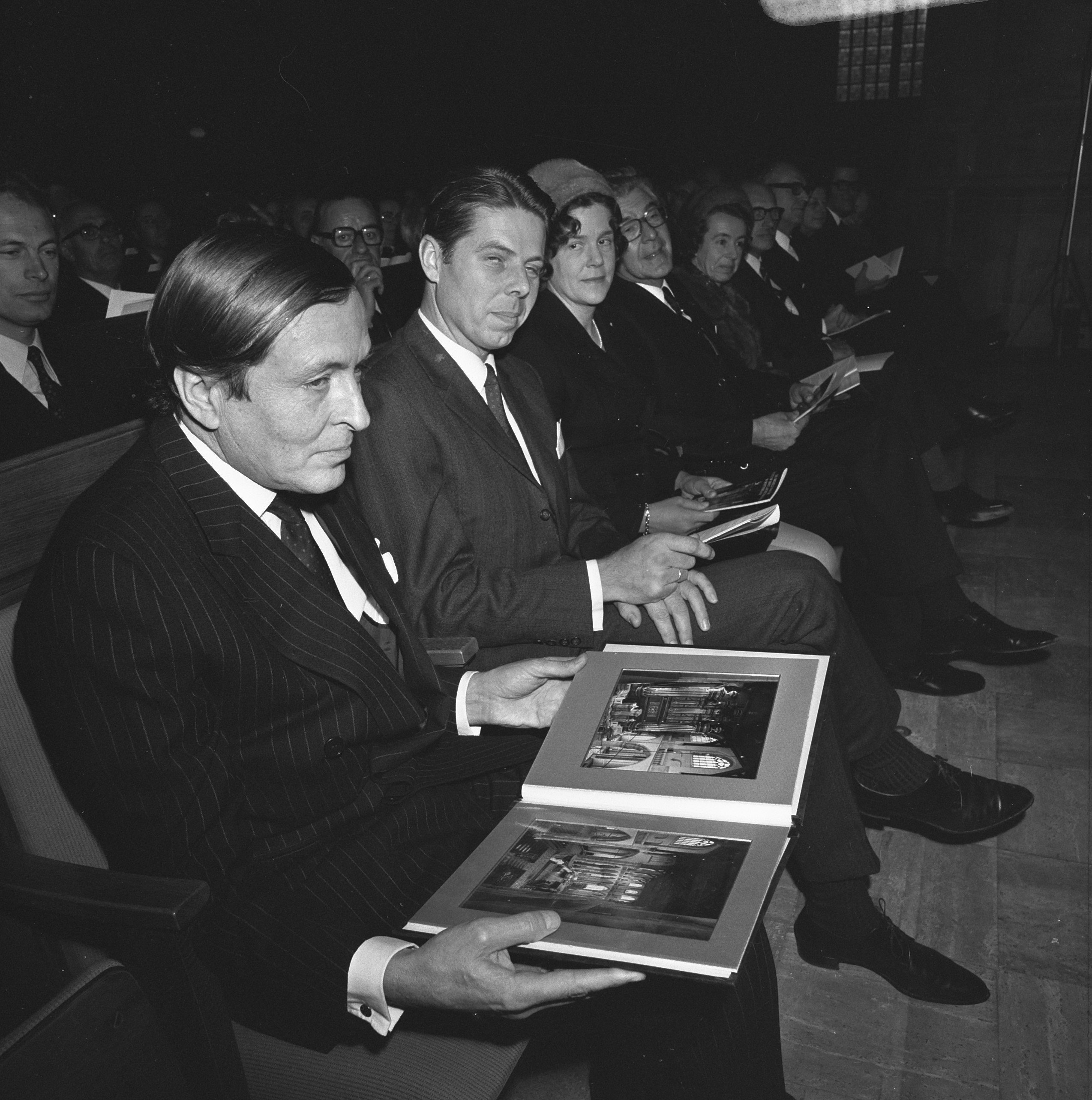 Collectie / Archief : Fotocollectie Anefo Reportage / Serie : Prins Claus is aanwezig bij de ingebruikneming van het nieuwe orgel in de St. Laurenskerk in Rotterdam Beschrijving : De prins, op de voorgrond, bekijkt een fotoboek Datum : 8 december 1973 Locatie : Rotterdam, Zuid-Holland Trefwoorden : Ingebruiknames, fotoboeken, prinsen Persoonsnaam : Claus, prins Instellingsnaam : Sint-Laurenskerk Fotograaf : Mieremet, Rob / Anefo Auteursrechthebbende : Nationaal Archief Materiaalsoort : Negatief (zwart/wit) Nummer archiefinventaris : bekijk toegang 2.24.01.03 Bestanddeelnummer : 926-8758